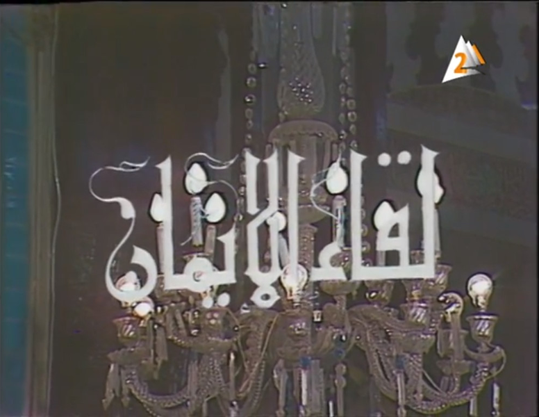 مصرى: برنامج لقاء الإيمان .. من البرامج التى قام بإخراجها المخرج أحمد الشناوى